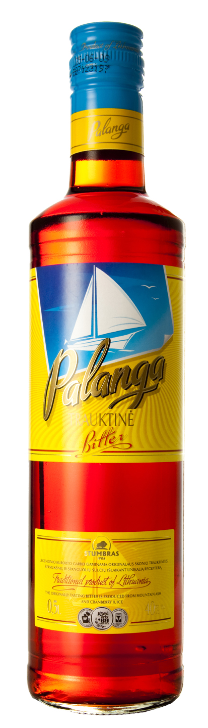 Garantuotas tradicinis gaminys